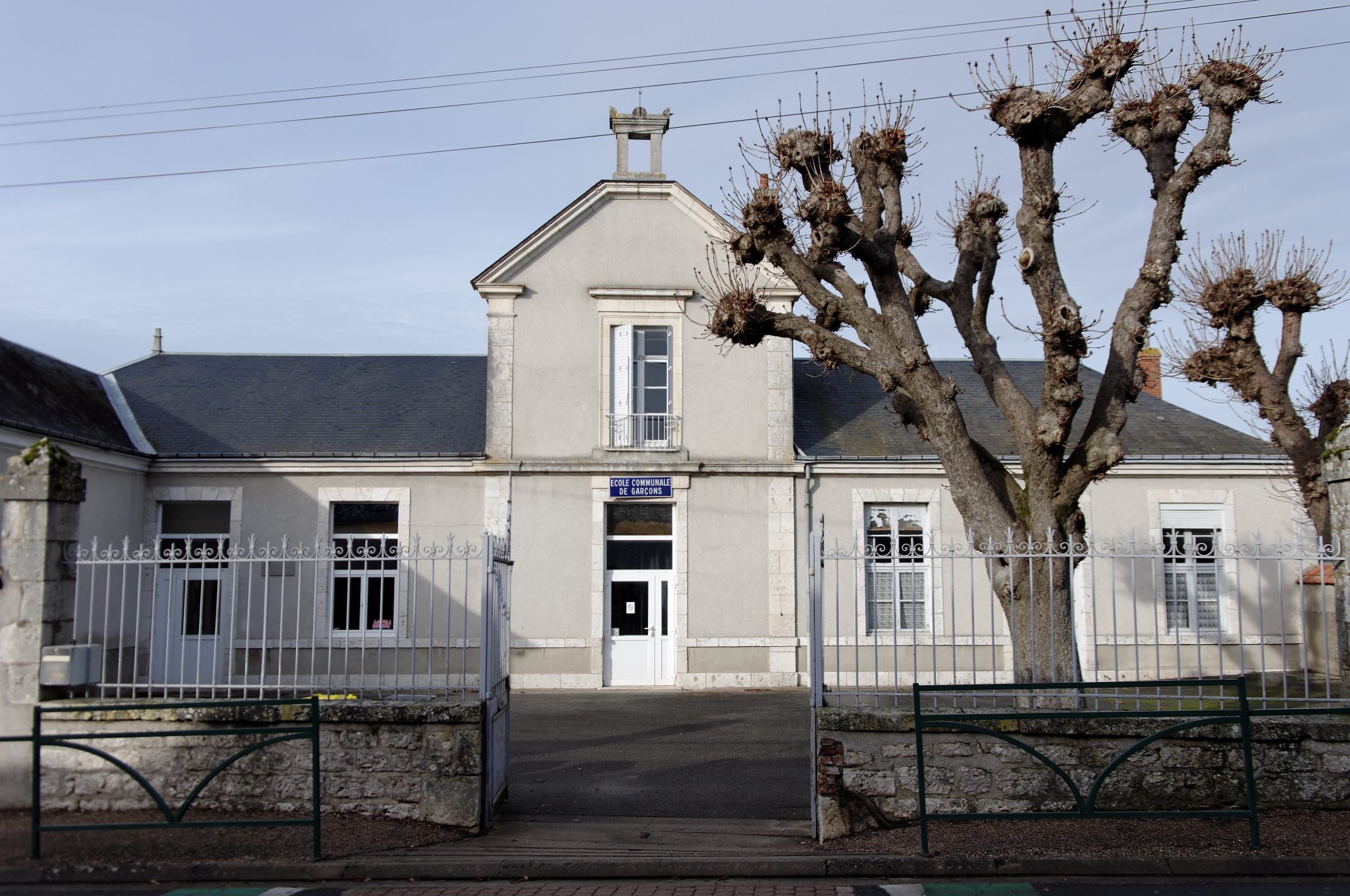 Ancienne École communale, Tavers, Loiret, France